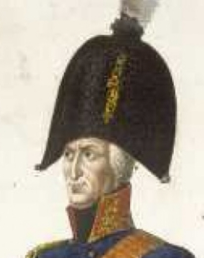 Friedrich Adolf von Kalckreuth (1737-1818), preußischer Feldmarschall